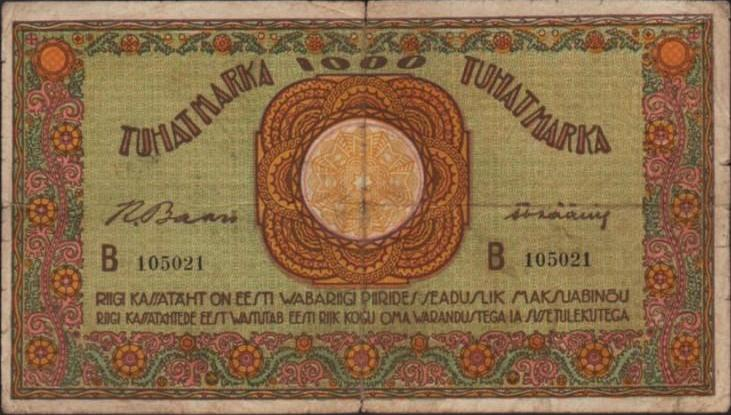 Estonian 1000 Mark note